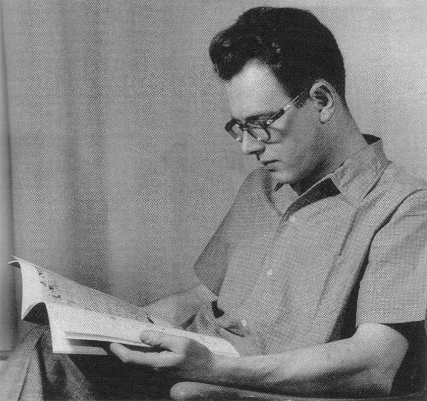 Mårten Larsson ca 1950